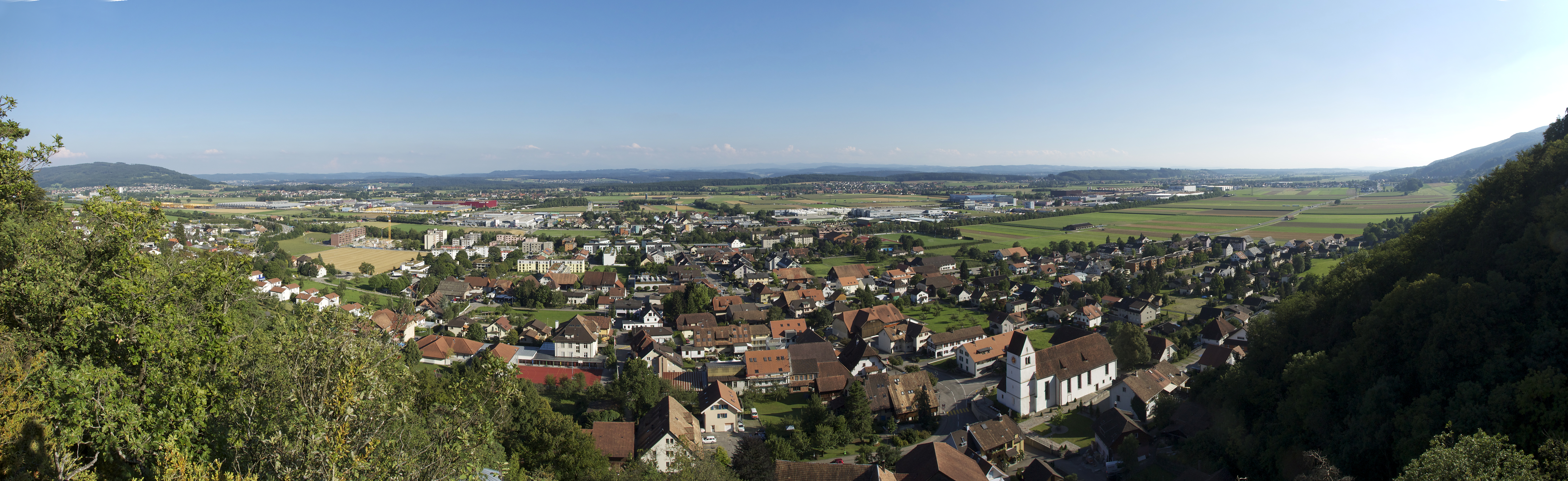 Blick ins Gäu. Zu sehen ist Egerkingen (Vorgergrund und Standort) sowie v.r.n.l.: Oberbuchsiten und Niederbuchsiten, Neuendorf, Härkingen, Gunzgen und Kappel